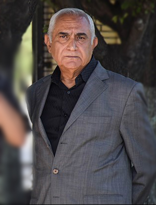 ناصر ممدوح ۲۵ مرداد ۱۳۹۷